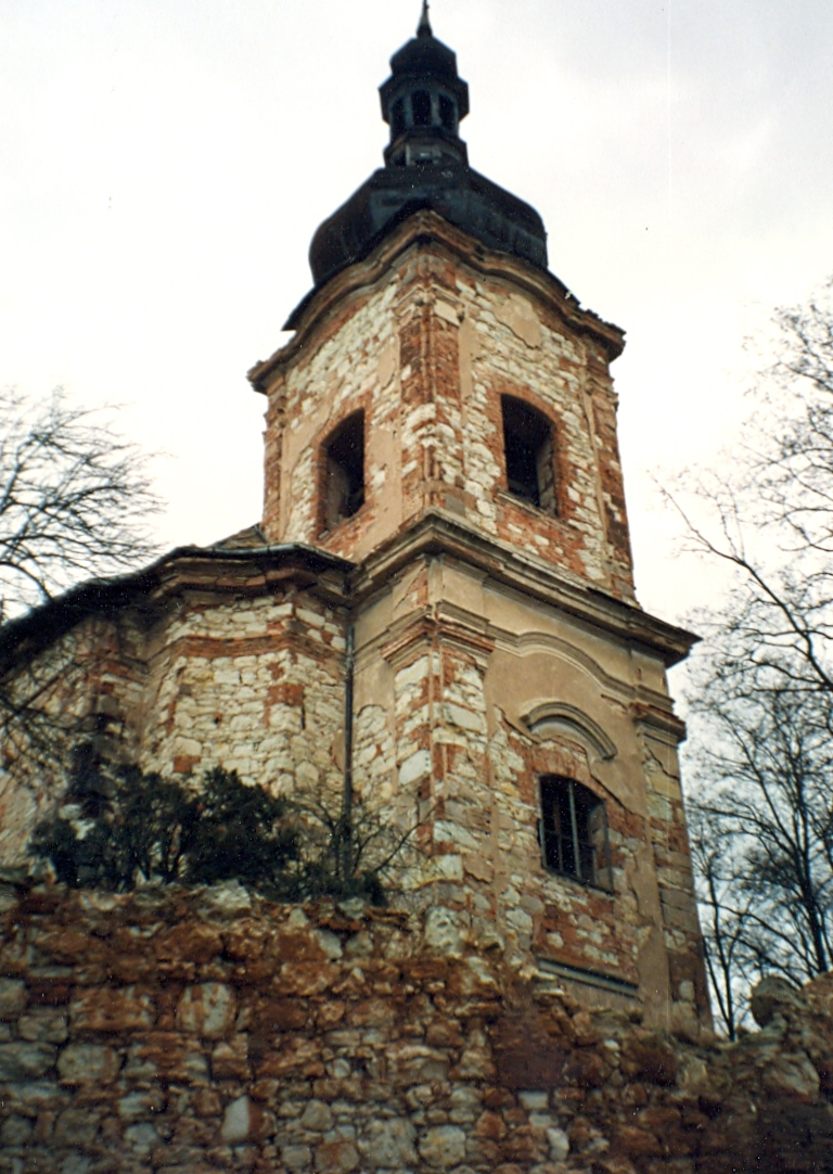 The church in Sirem, Czech Republic.